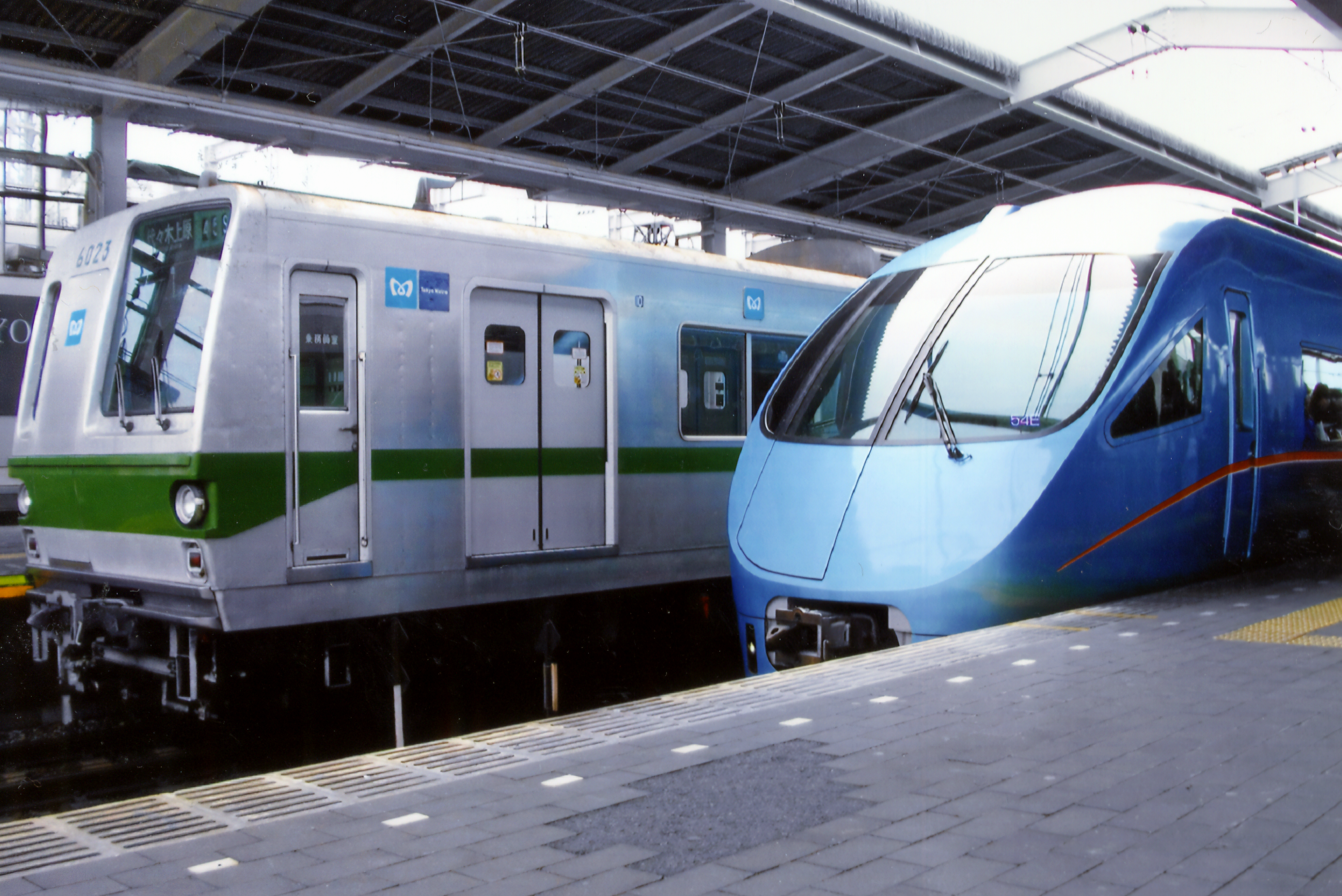 東京地下鉄6000系と小田急電鉄60000形「MSE」